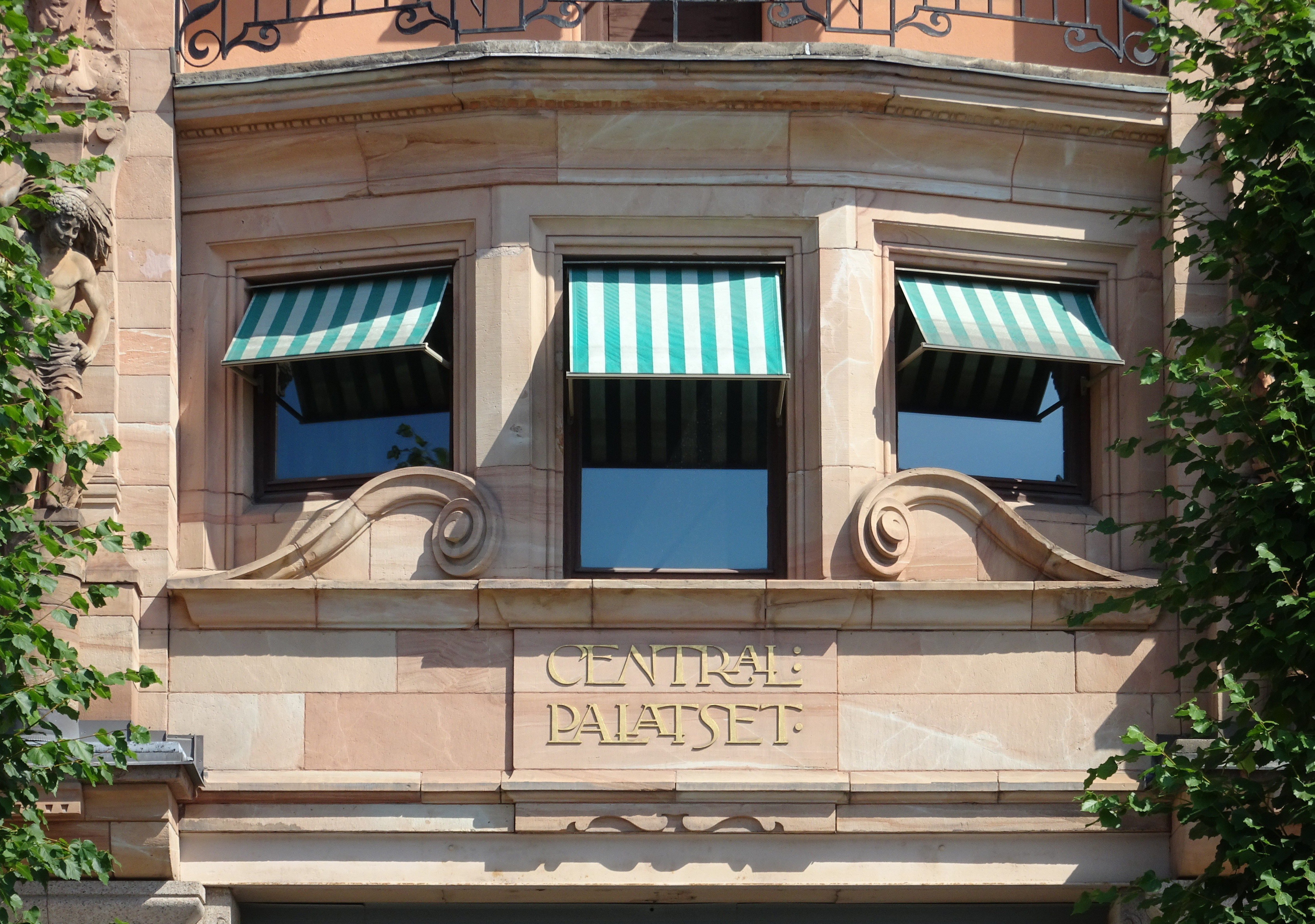 Centralpalatset, Stockholm, text över huvudentrén